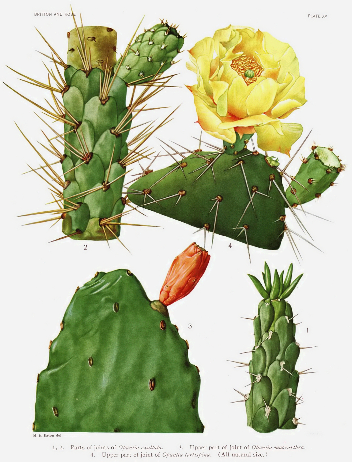 Runa Simi: Qarwakasha Opuntia subulata.